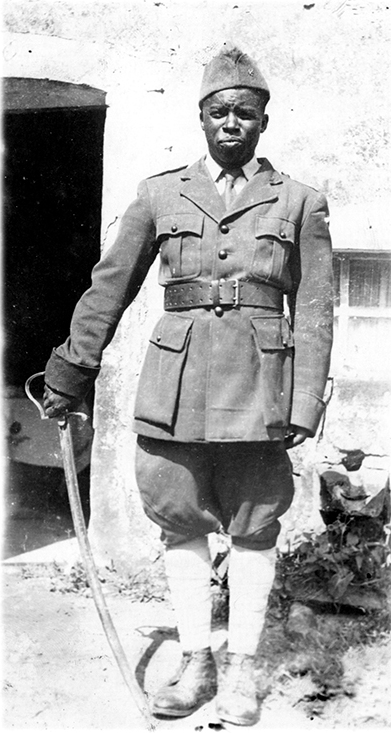 Addi Ba avec son fameux sabre à Tollaincourt (Vosges) devant la maison qu'il occupait, 1943.